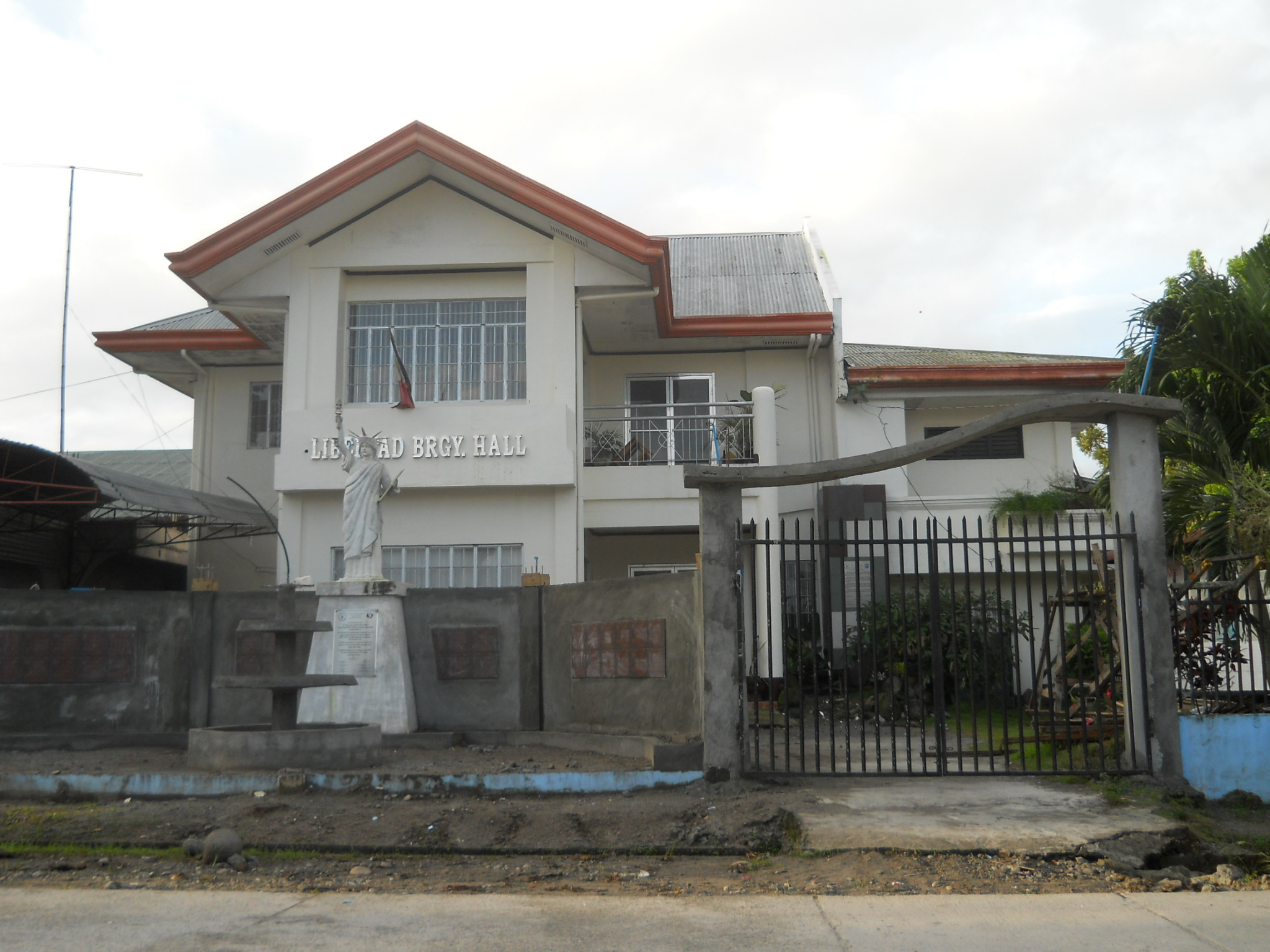 Libertad Barangay Hall, Surallah, South Cotabato